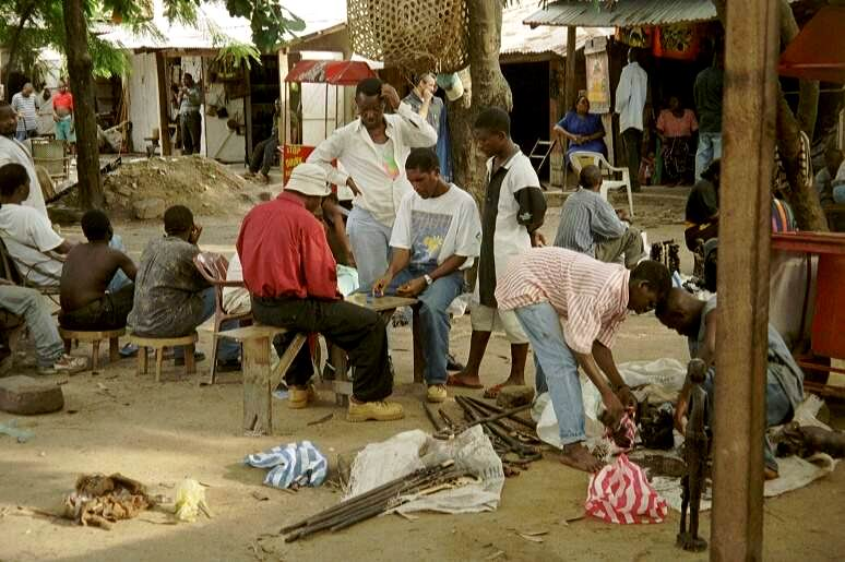 Makonde-Schnitzer auf dem Mwenge-Markt in Daressalaam bei einer Arbeitspause